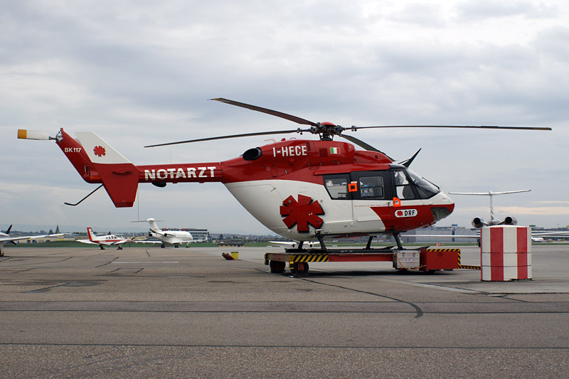 Deutsche Rettungsflugwacht BK 117 I-HECE